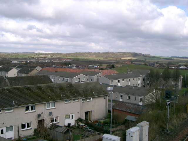 Cardenden